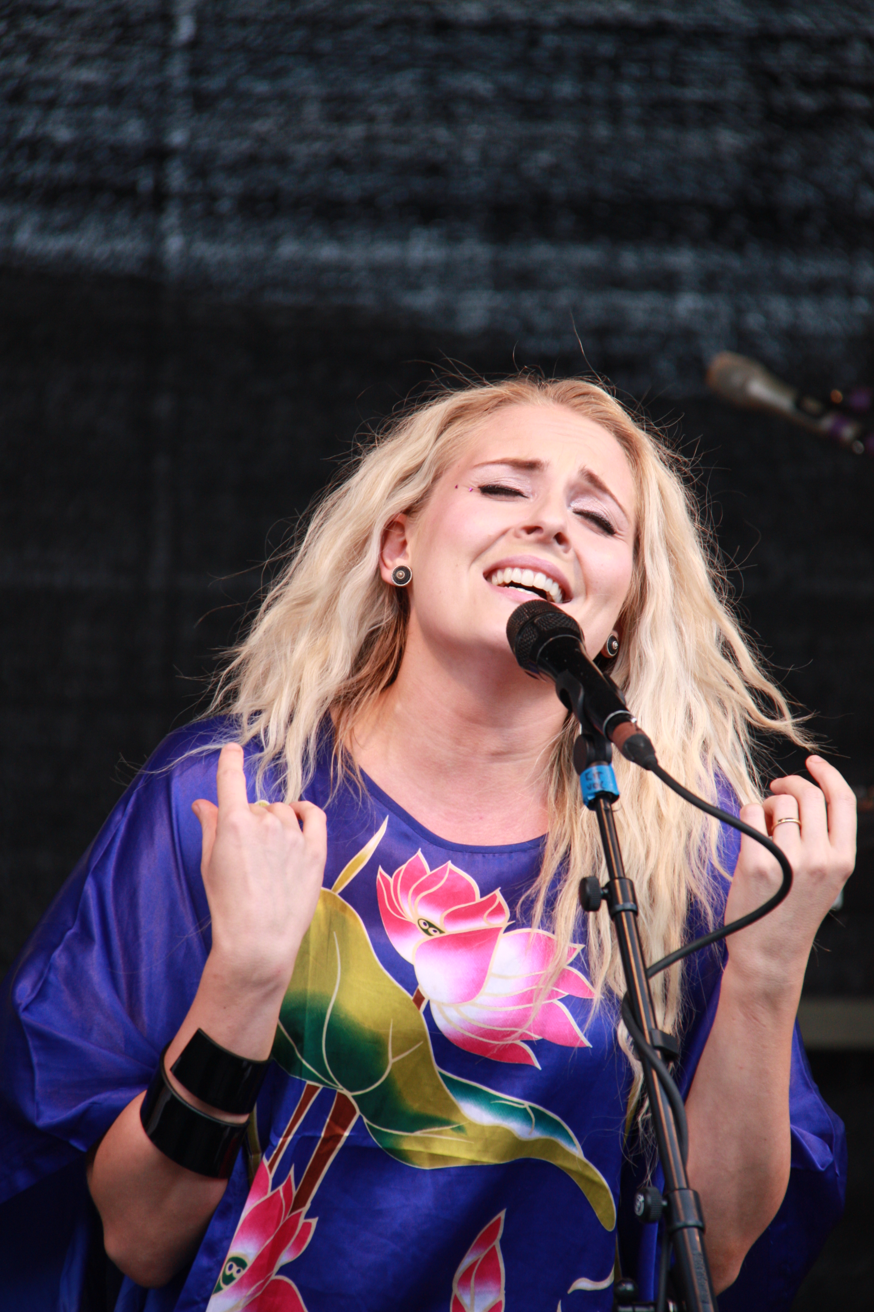 Eivør Pálsdóttir under en konsert sammen med Vamp på Lindesnes fyr 2011